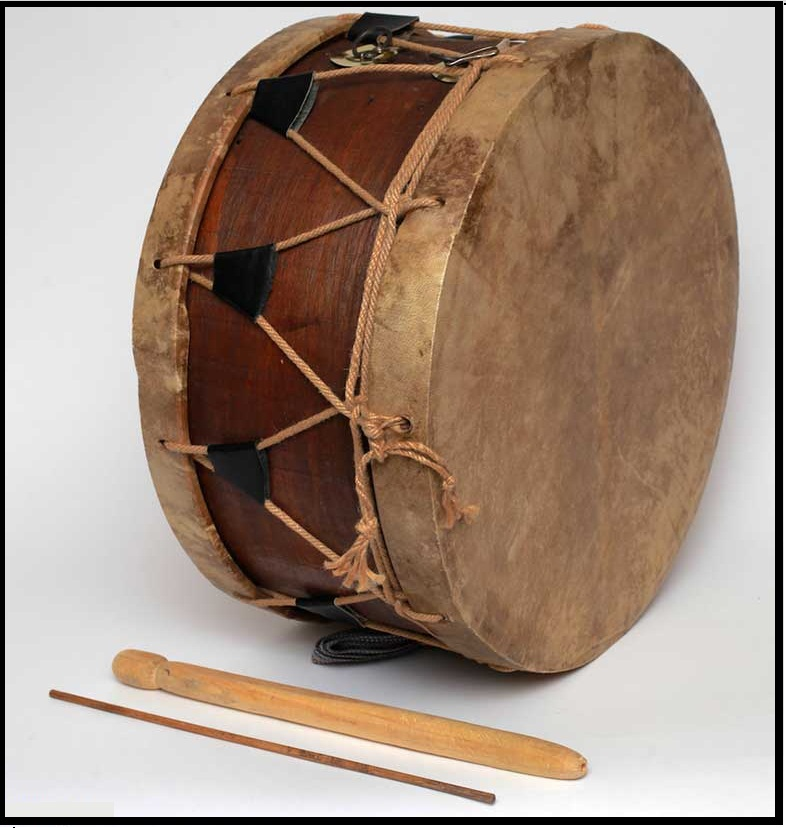 Tambor de medio oriente y los Balcánes